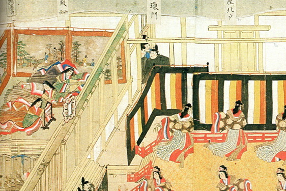 『年中行事絵巻』巻五「内宴」に描かれる綾綺殿の軟障（左）と幔（右）